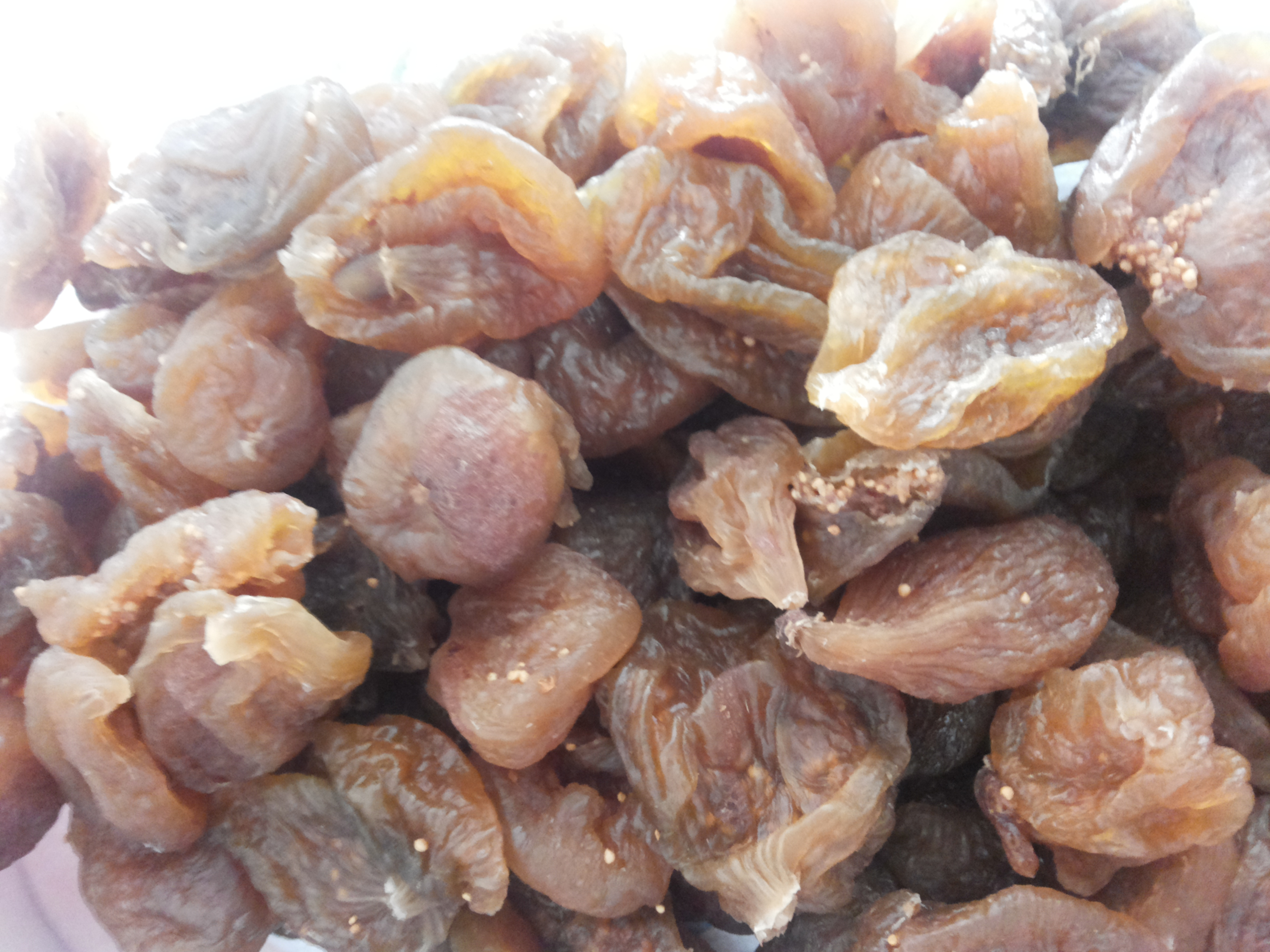 Fichi secchi Sicilianu: Passuluna